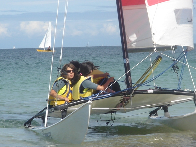 Dériveurs et catamarants de loisir, plage de grands sables, à Belle-Île-en-Mer (56)